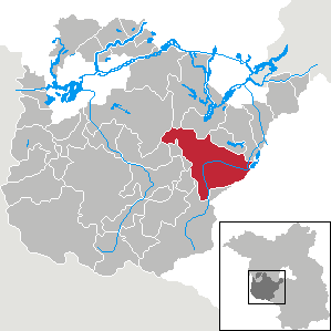 Beelitz in Brandenburg (Country) - District Potsdam-Mittelmark